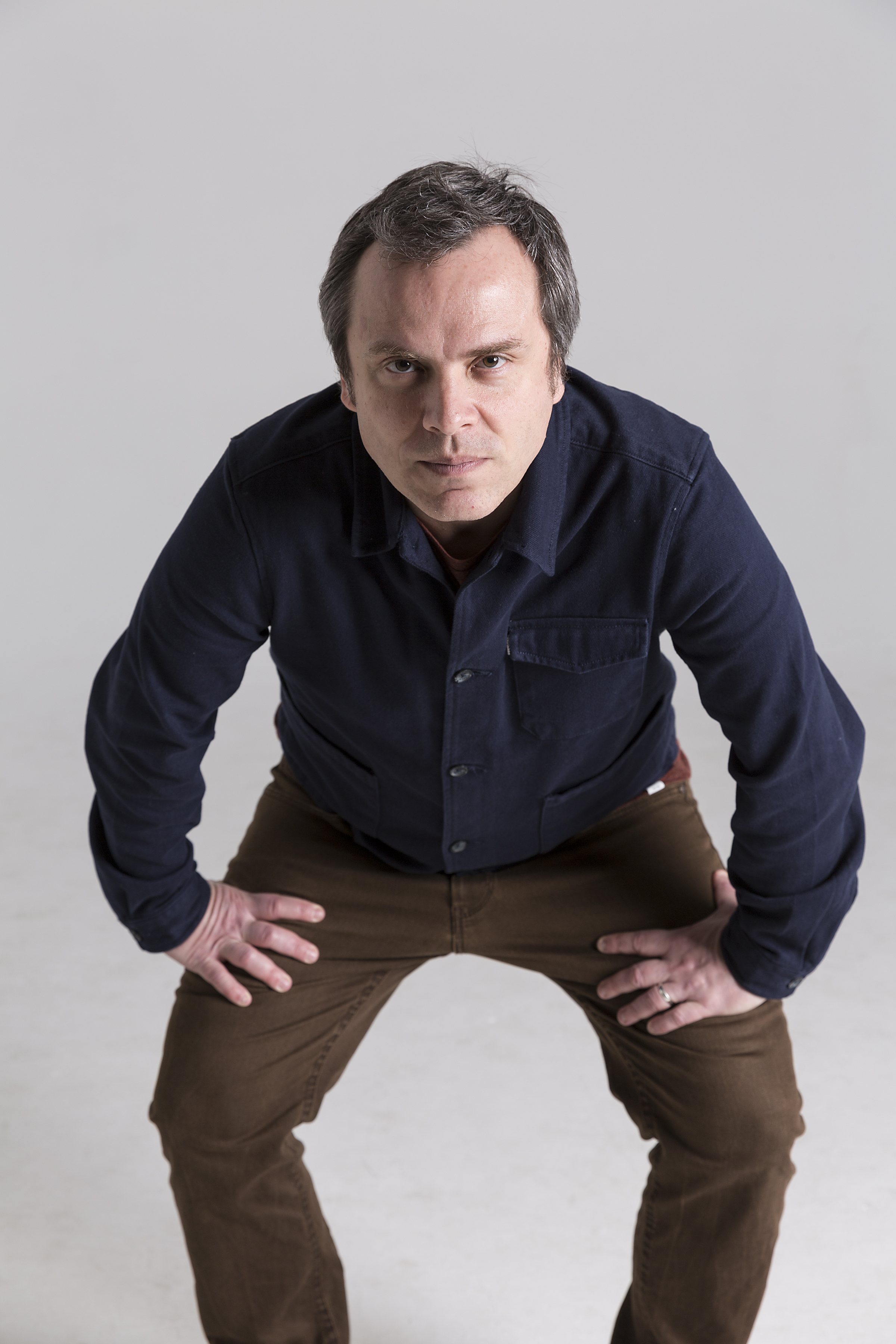 Armando Lôbo - compositor pernambucano - Crédito: Suzanne Hefron